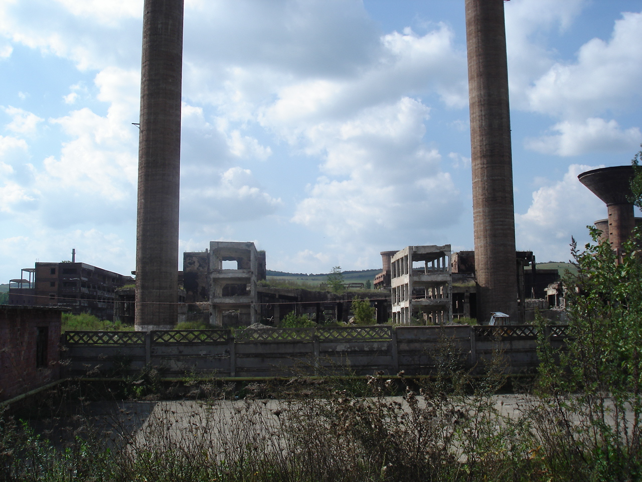 "Ruine moderne" - Combinatul din Călan, sau mai bine zis, ce-a mai rămas din el în anul 2007,reprezentarea a fostelor furnale metalurgice, de pe platforma industriala a Combinatului.